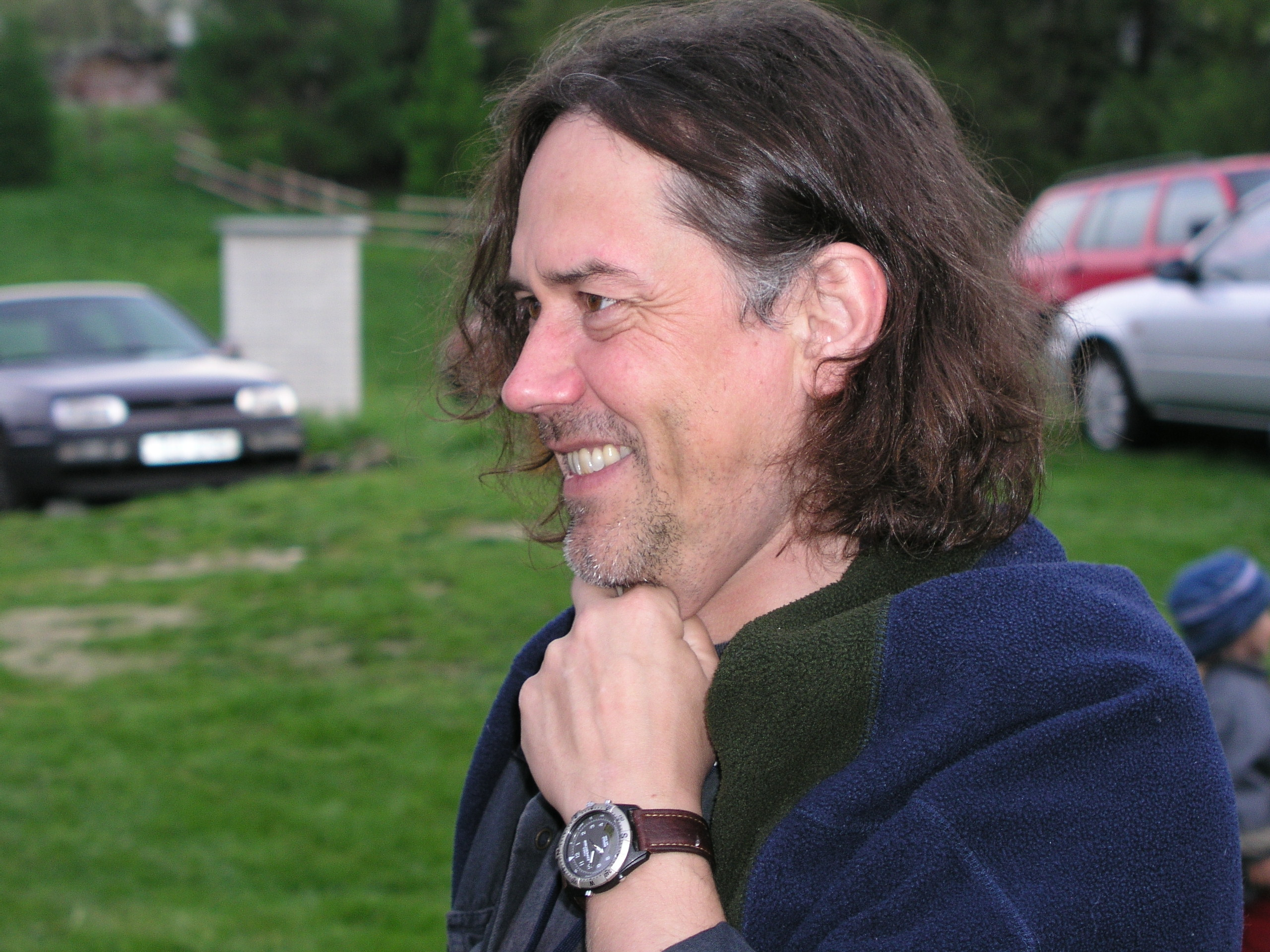 Marek Brodský v Kytlicích 2004